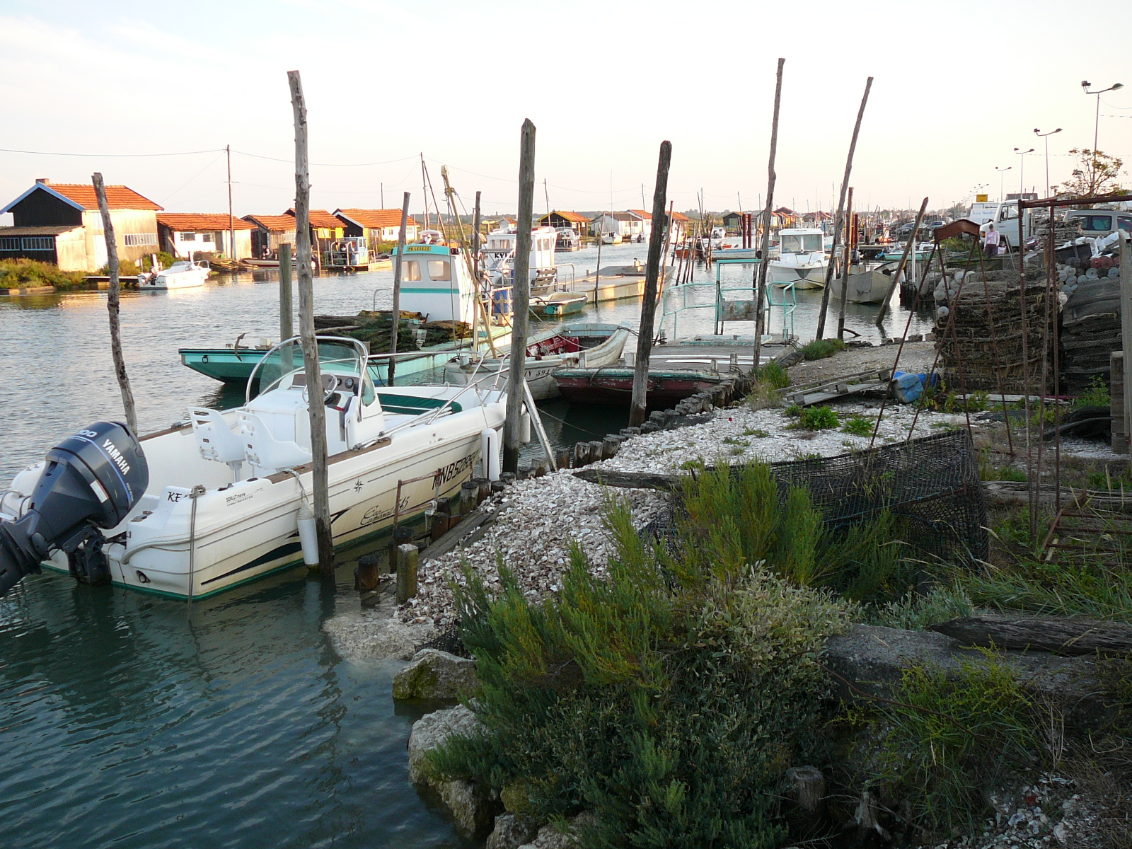 La Grève, La Tremblade, Charente-Maritime (17) France